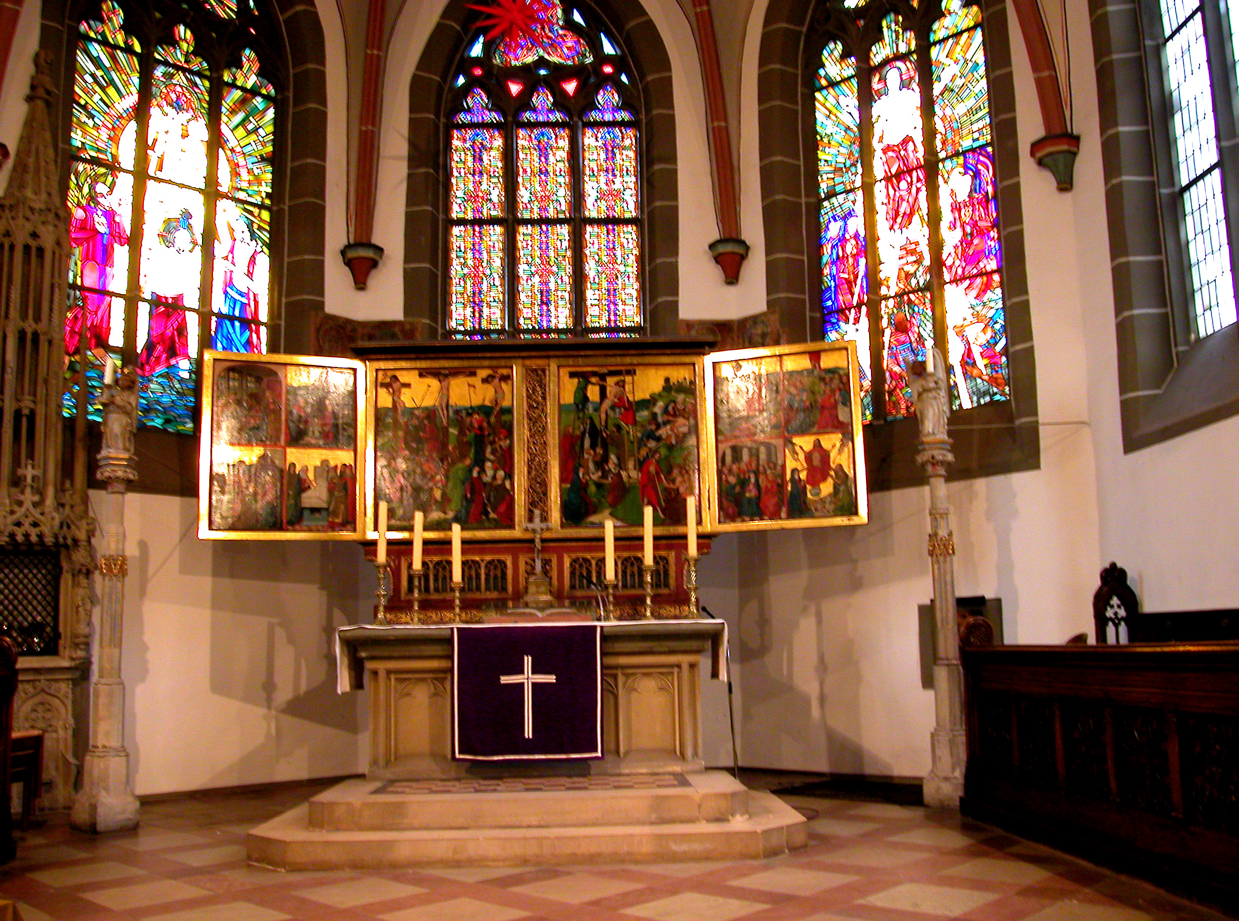 Altarraum Stadtkirche St. Georg. Luenen (de); Алтарь церкви св. Георга. Люнен (ru).